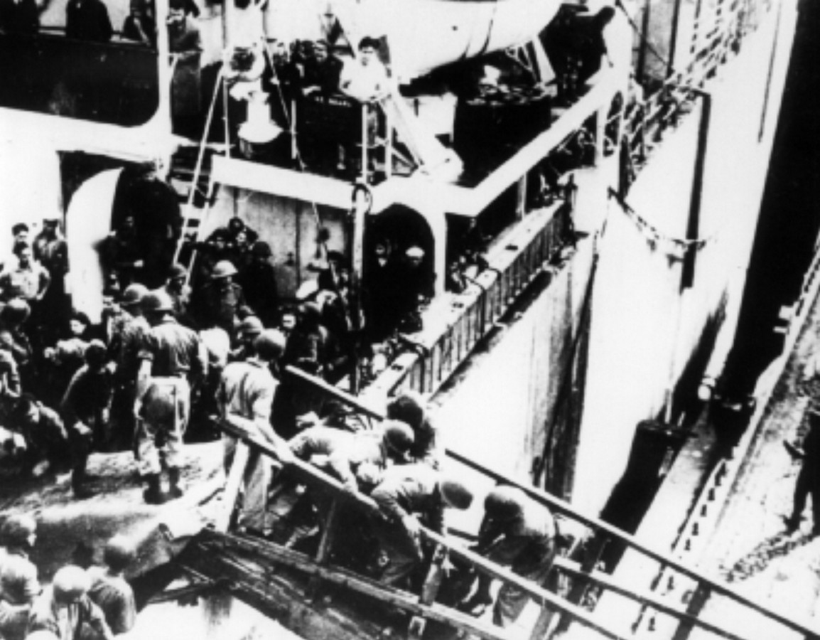 פלי"ם ספינות המעפילים ג - אקסודוס - ספינות המעפילים – אקסודוס יציאת אירופה תשז - אולטימטום - הורדת המעפילים בהאמבורג